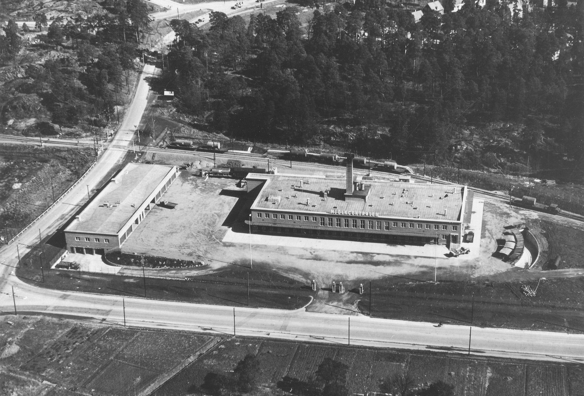 Enskedemejeriet i Enskede